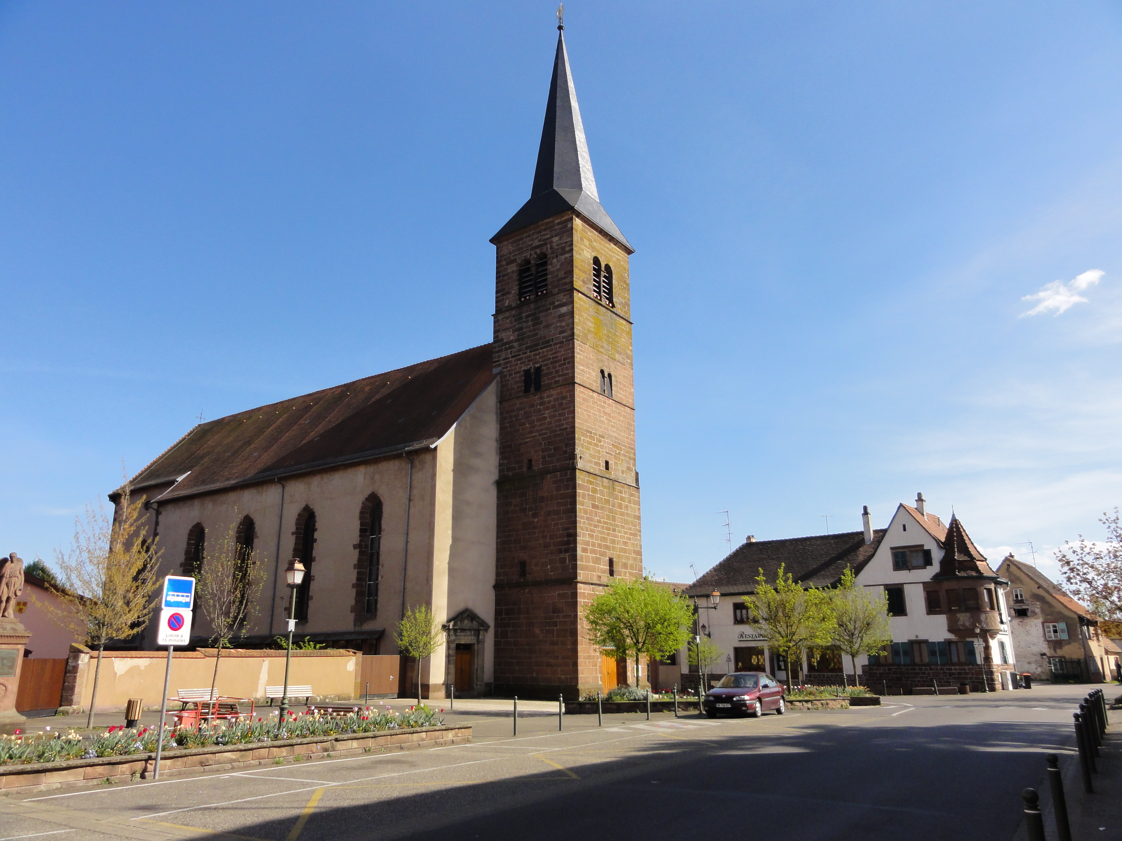 Alsace, Bas-Rhin, Église Notre-Dame-de-l’Assomption de Monswiller (IA00055527).